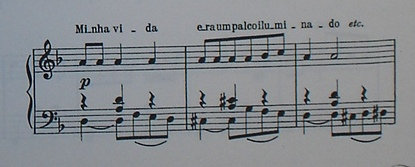 O tema de Chão de Estrelas. Aquilo que, em direitos autorais, chama-se citar um trecho.